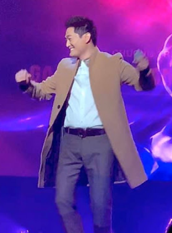 Lâm Nhật Tiến trong một chương trình ca nhạc tại hải ngoại tháng 10 năm 2019